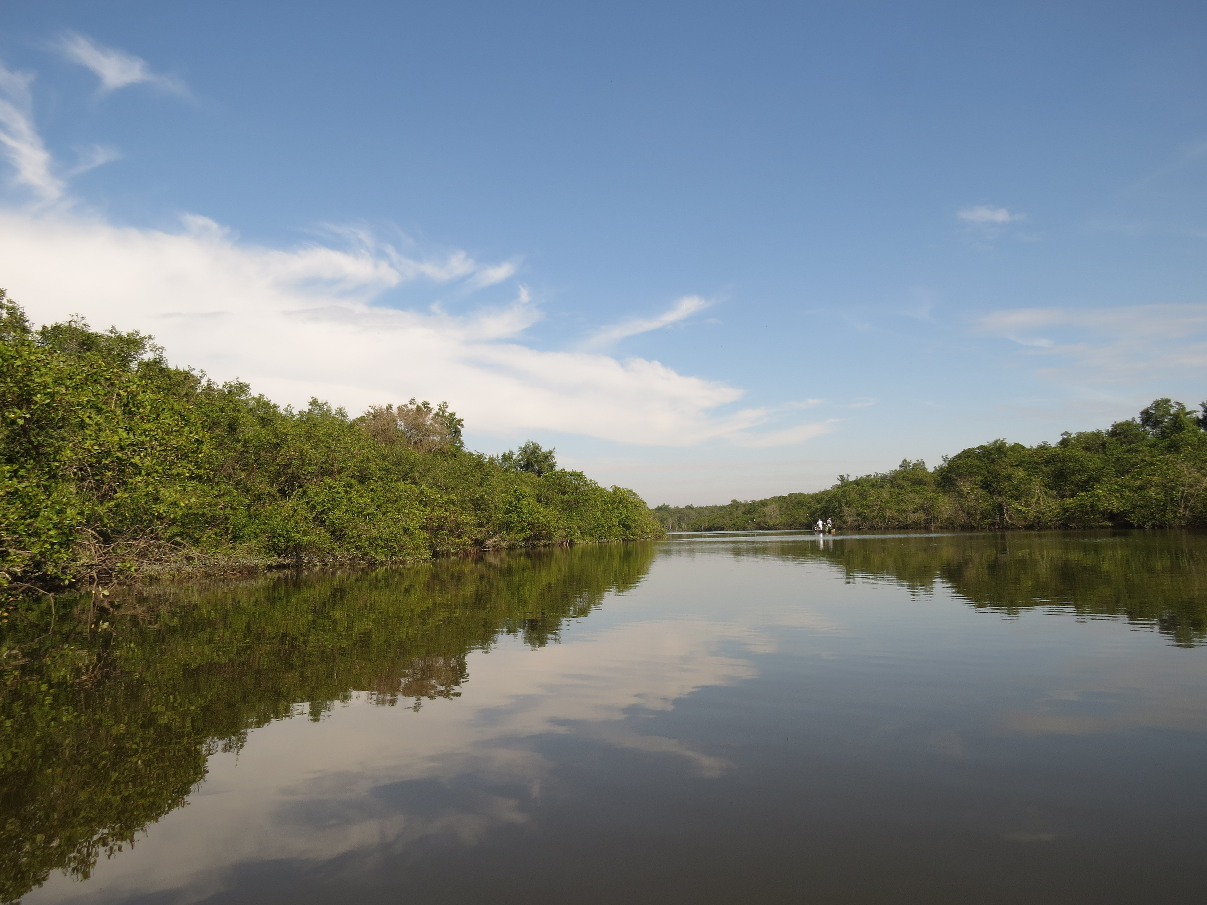 Manguezal do Rio Macacu, localizado dentro da APA de Guapimirim.